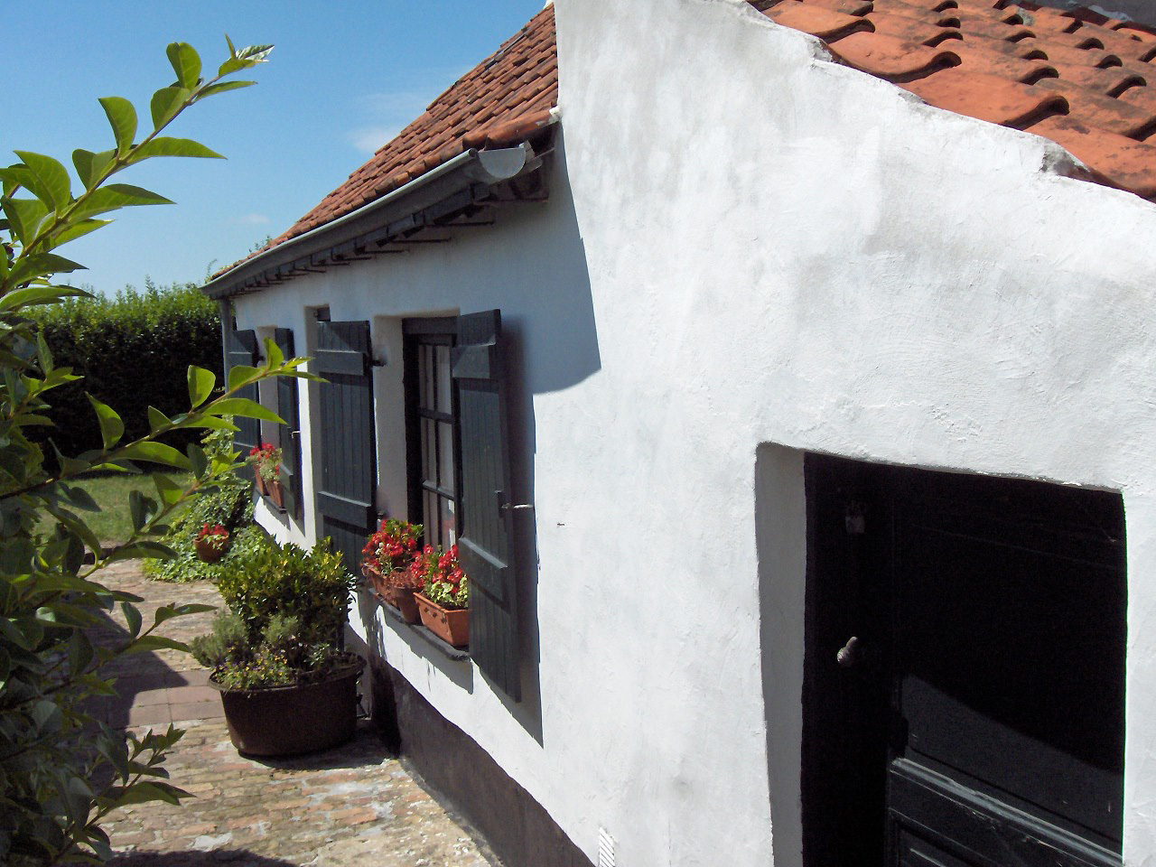 Last remaining fisherman's cottage (1822) near Onze-Lieve-Vrouw-ter-Duinenkerk; Ostend, Belgium